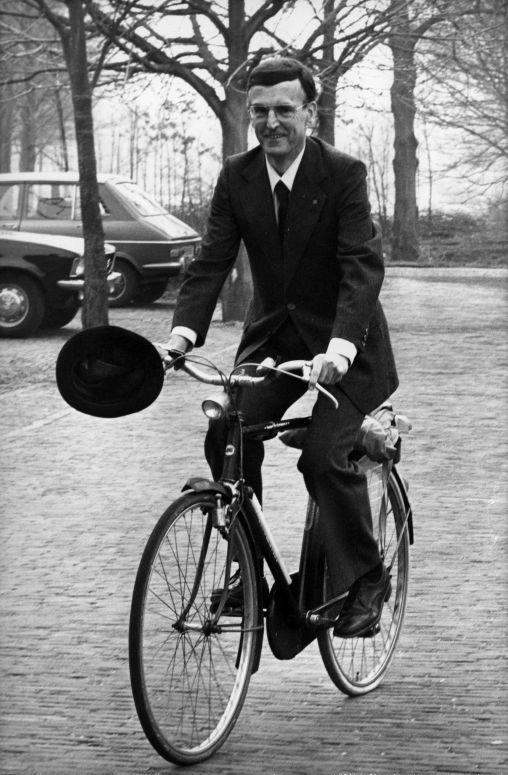 Dr. Willem Drees jr., fraktieleider van DS '70, arriveert op Huis ten Bosch in Den Haag ('s-Gravenhage). H. M. de Koningin ontvangt de fraktieleiders van de politieke partijen in de Tweede Kamer. 24 mei 1977.